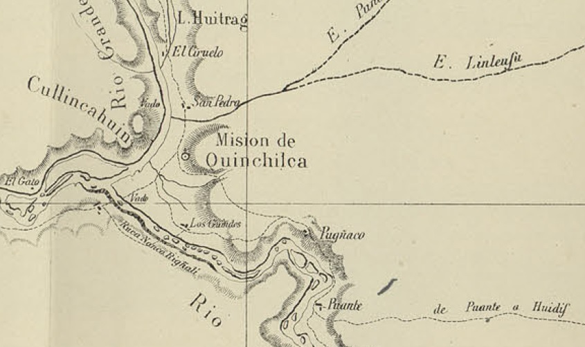 Mision de Quinchilca en el Mapa de la Expedicion de Francisco Vidal Gormaz 1869